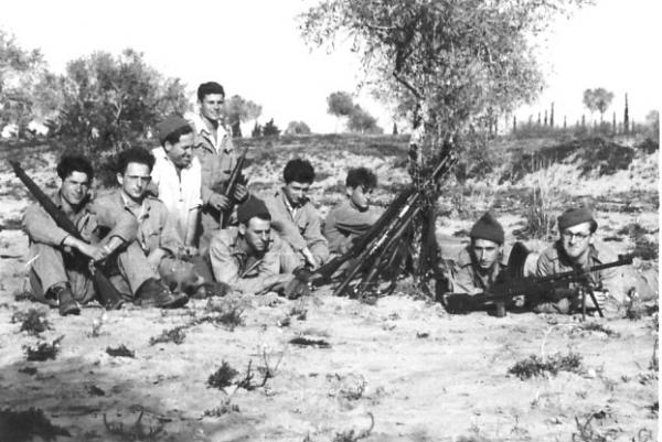 חברי ההגנה בגן-שמואל מתאמנים בנשק בלתי לגלי מהסליק.